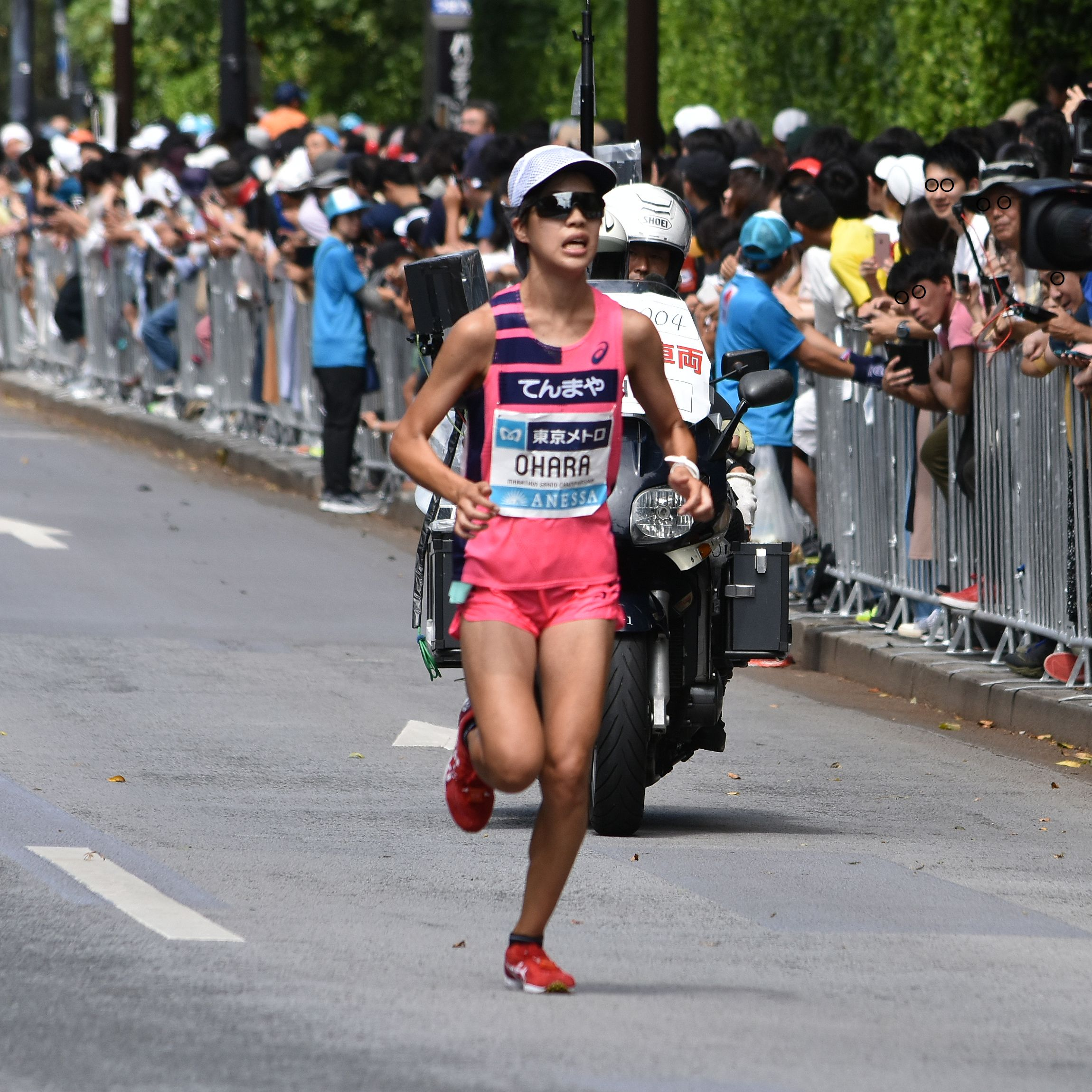 マラソングランドチャンピオンシップ 小原 怜